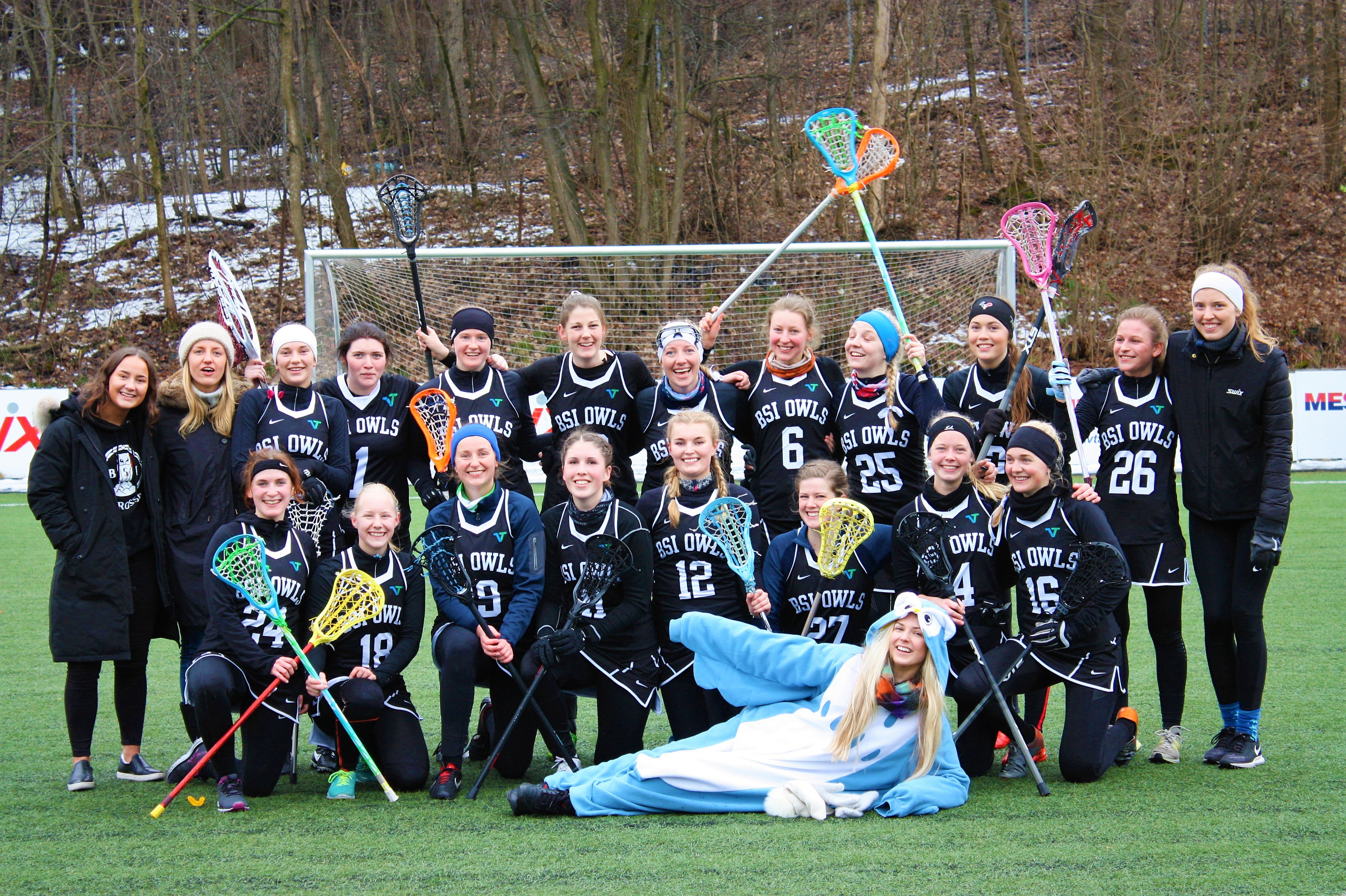 BSI Owls Lacrosse i NM runde i Oslo våren 2017